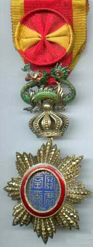 Description Ordre du Dragon Date23 mai 2006 à 17:02SourceOwn workAuthorJb1902 auteur de l'article Ordre du Dragon